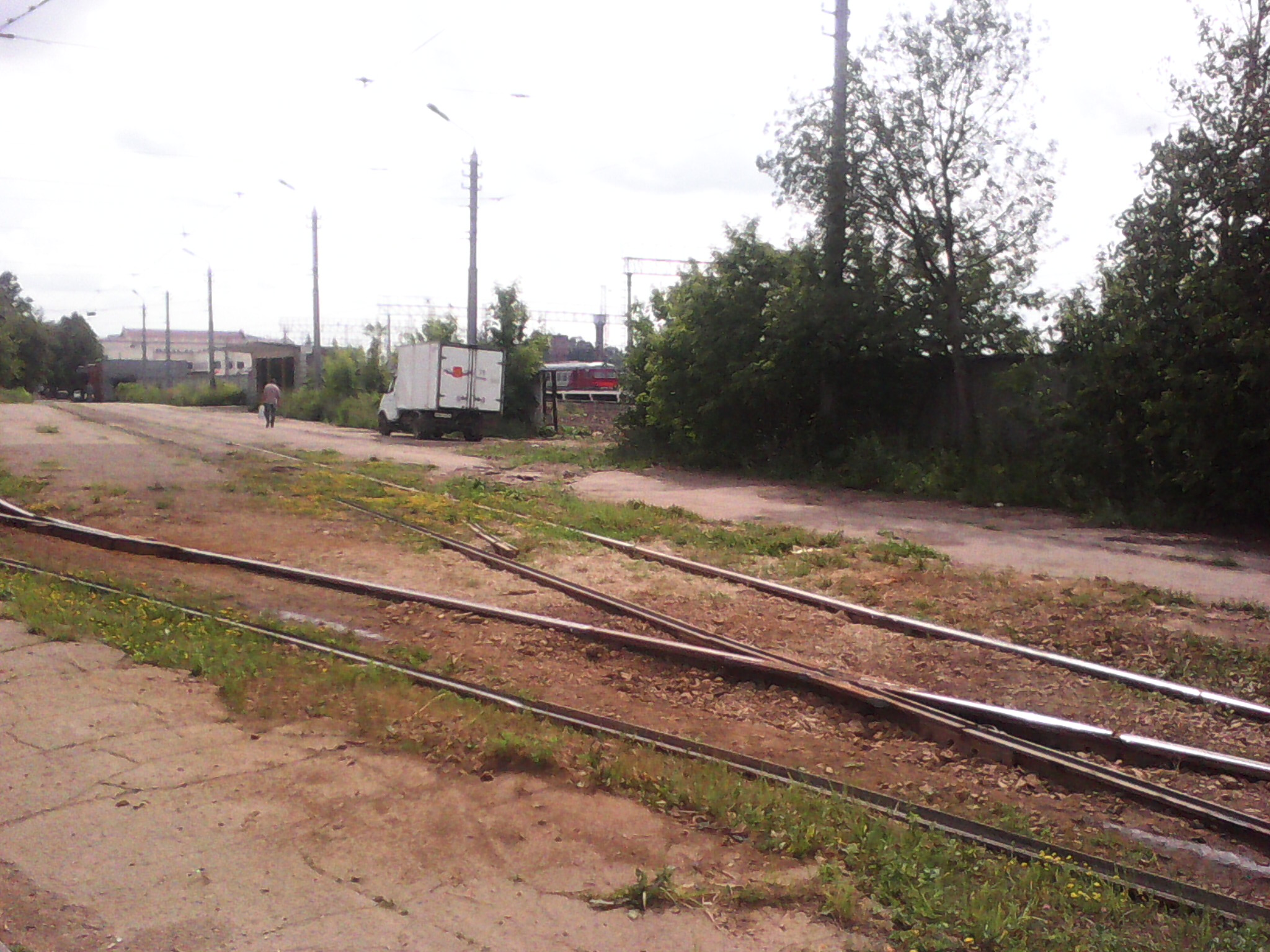 Ликвидированный съезд на МЖД